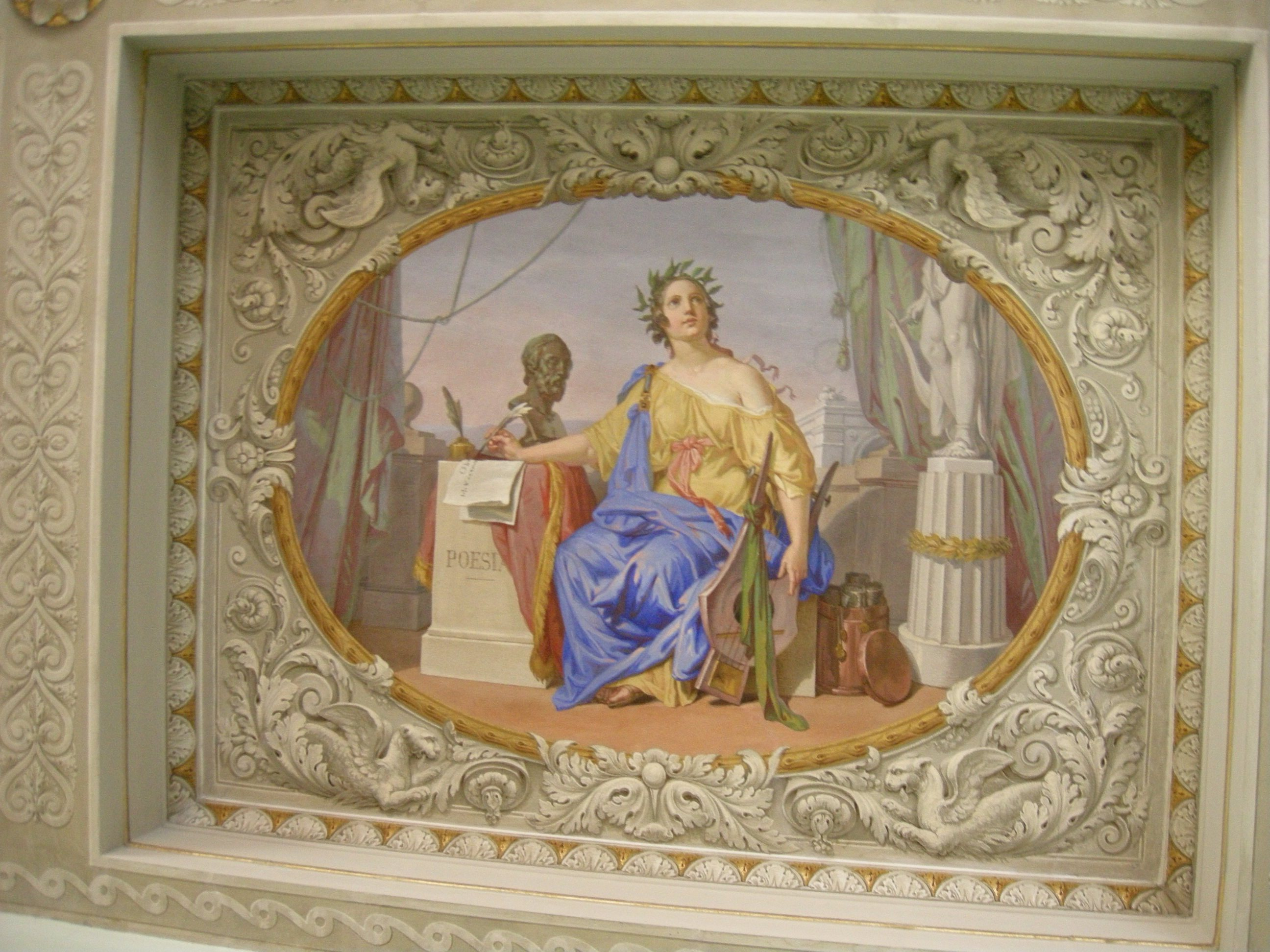 Palazzo rospigliosi pallavicini, sala delle arti, poesia